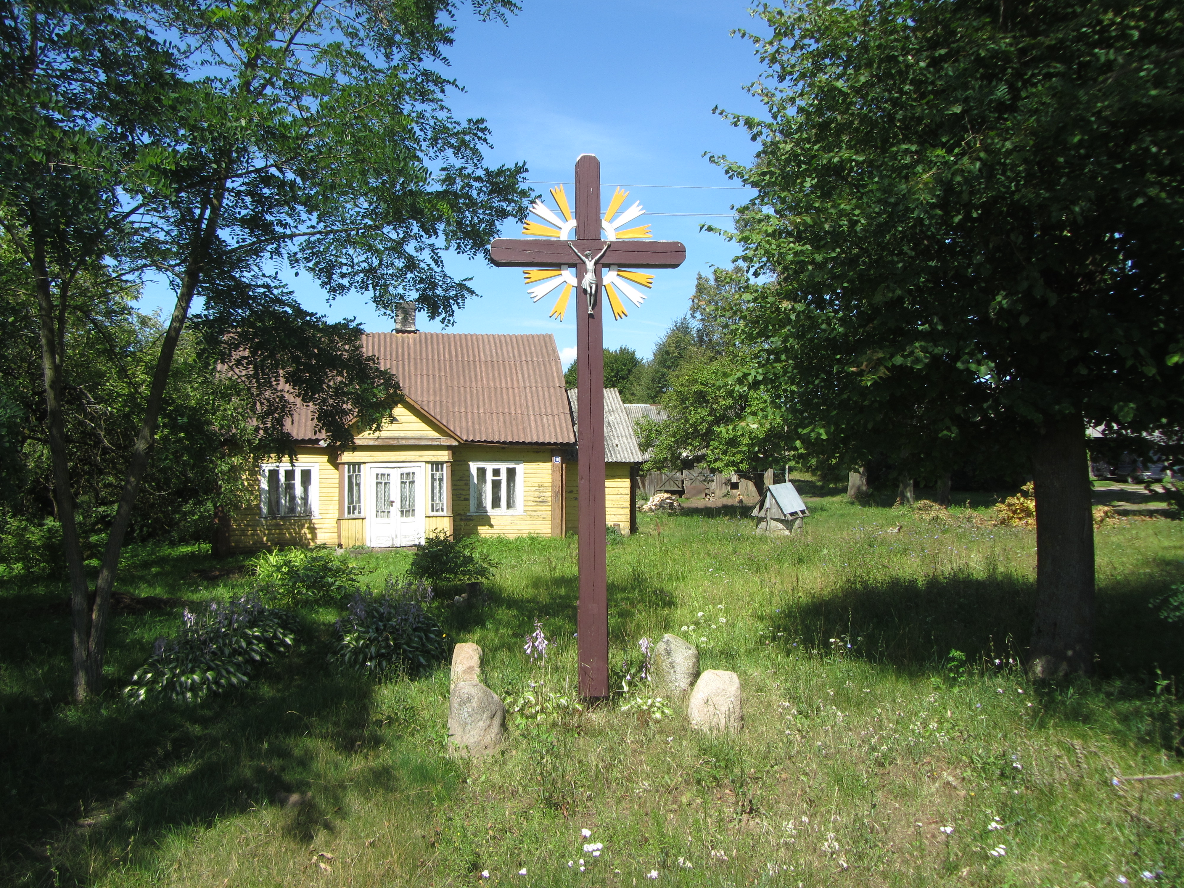 Žibavičiai, Lithuania